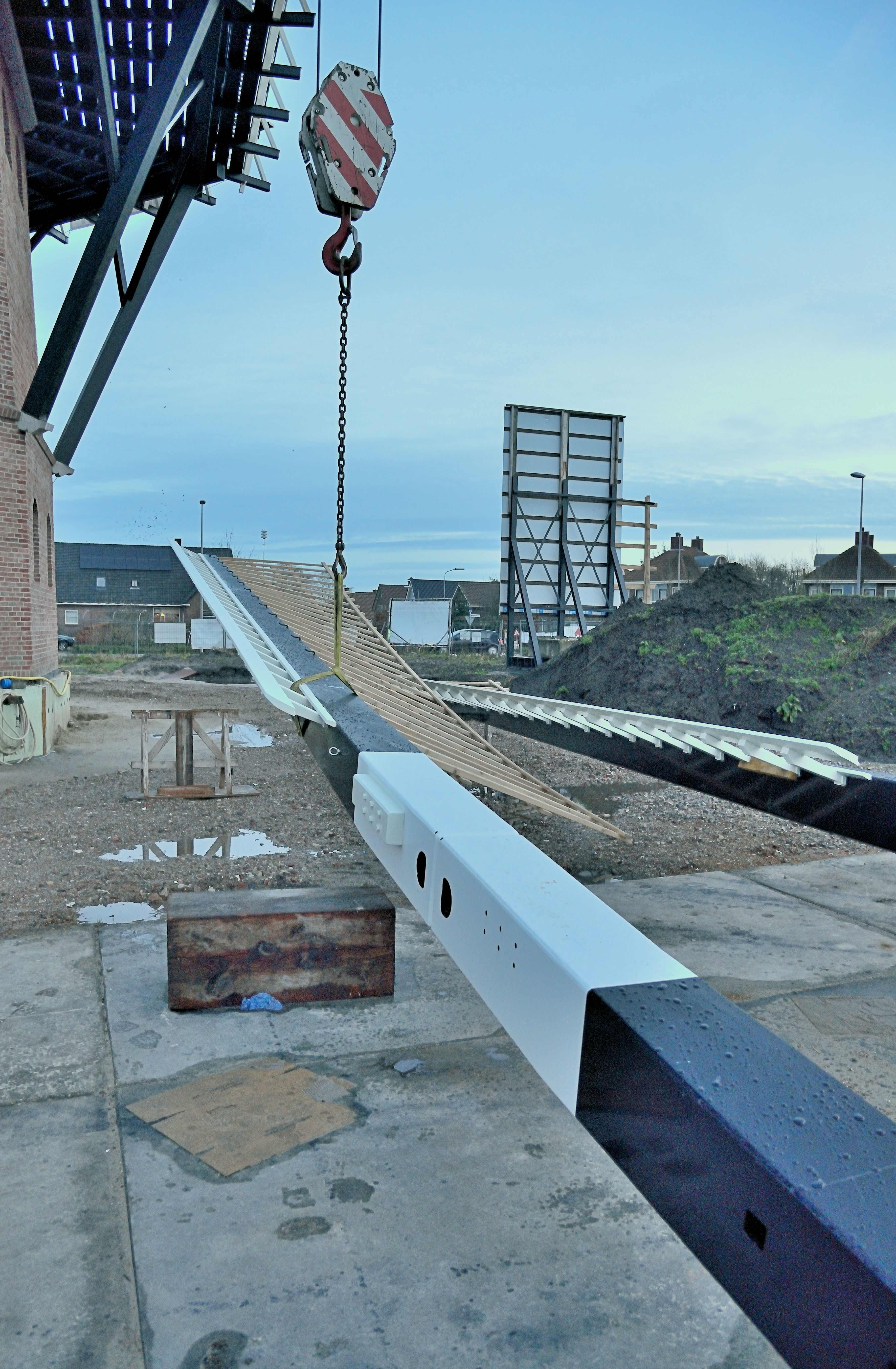 Puurveense molen, roesteken